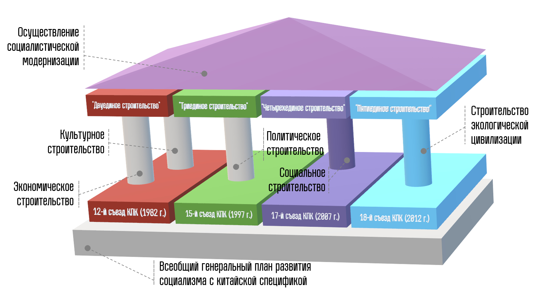 Схема развития генерального плана Пятиединого строительства КНР